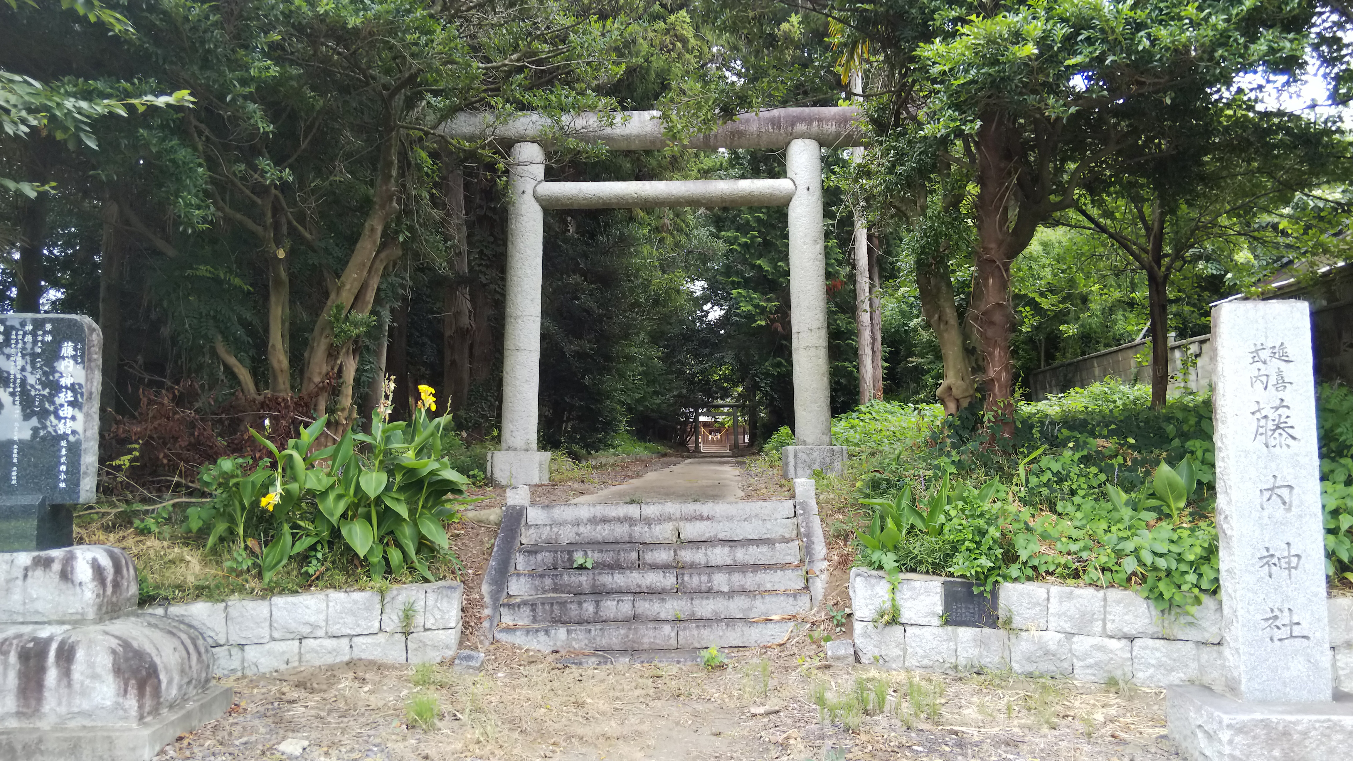 藤内神社鳥居